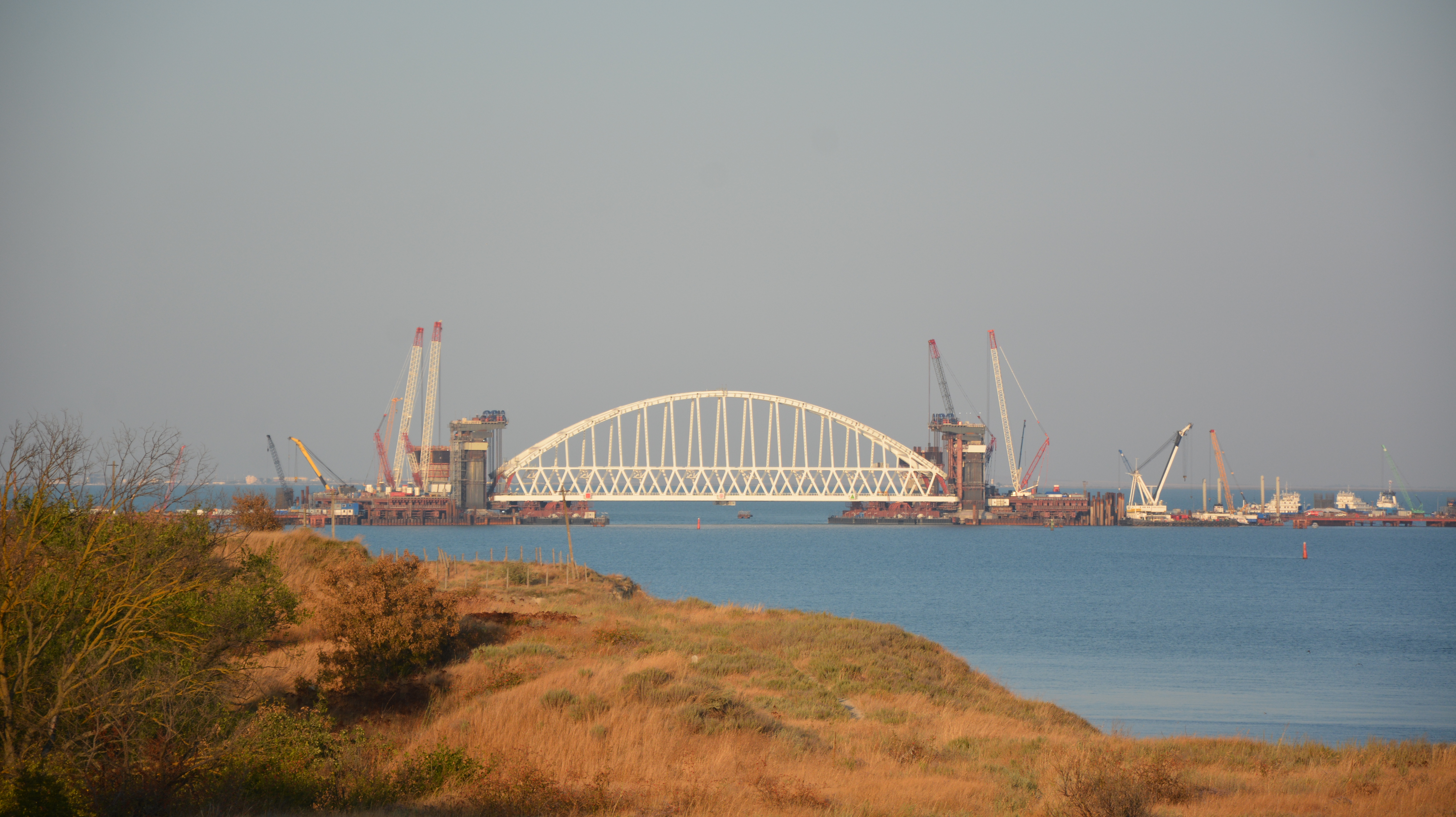 Операция по установке железнодорожной арки. Вечер перед непосредственным подъёмом. На подъёмные домкраты дана пробная нагрузка в 5% от номинальной.